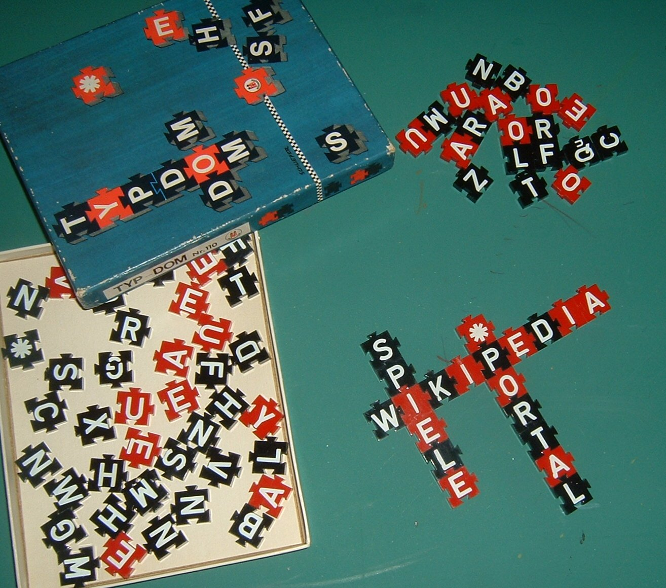 Typdom, Buchstabenspiel in Kreuzwortmanier, alte Ausgabe von etwa 1930